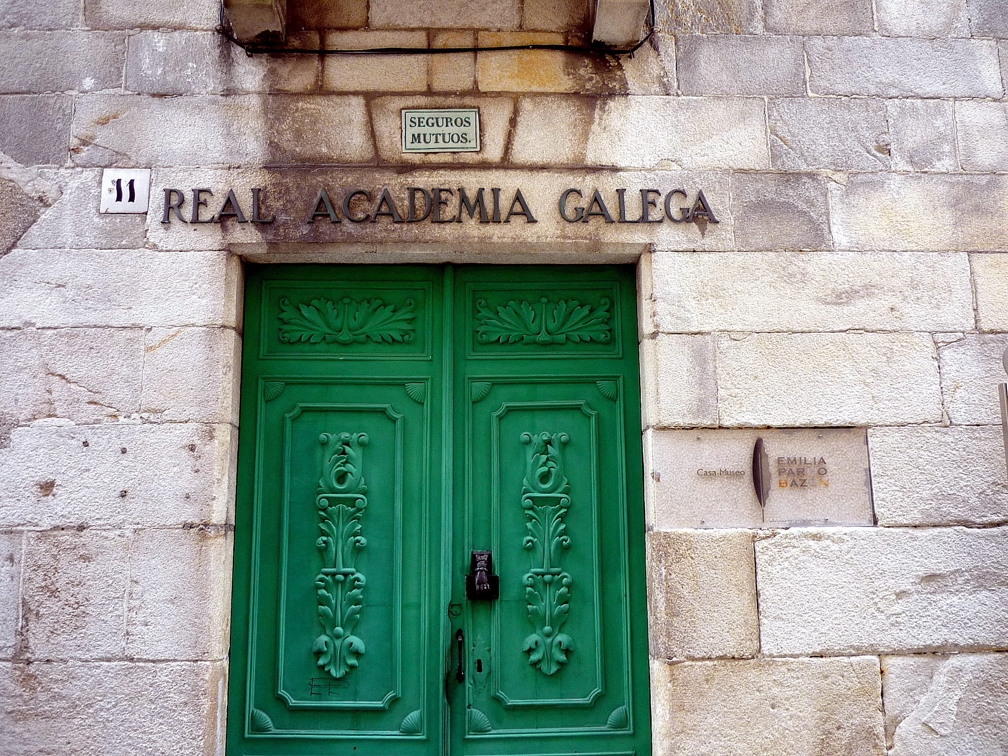 Edificio da Real Academia Galega, A Coruña